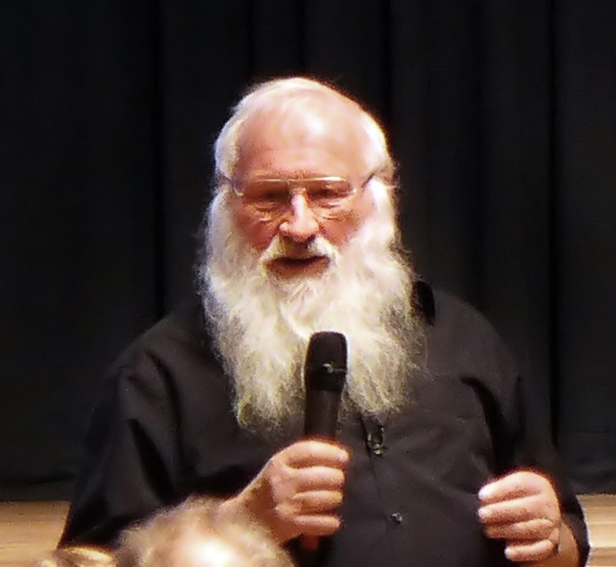 Prof. em. Berthold in der Stadthalle Northeim mit Diskussion und Vortrag zum Thema: Jeder Gemeinde ihr Biotop